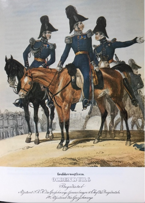 Altkolorierte Lithographie aus Heinrich Ambros Eckert und Dietrich Monten »Das deutsche Bundesheer in charakteristischen Gruppen« 1838.